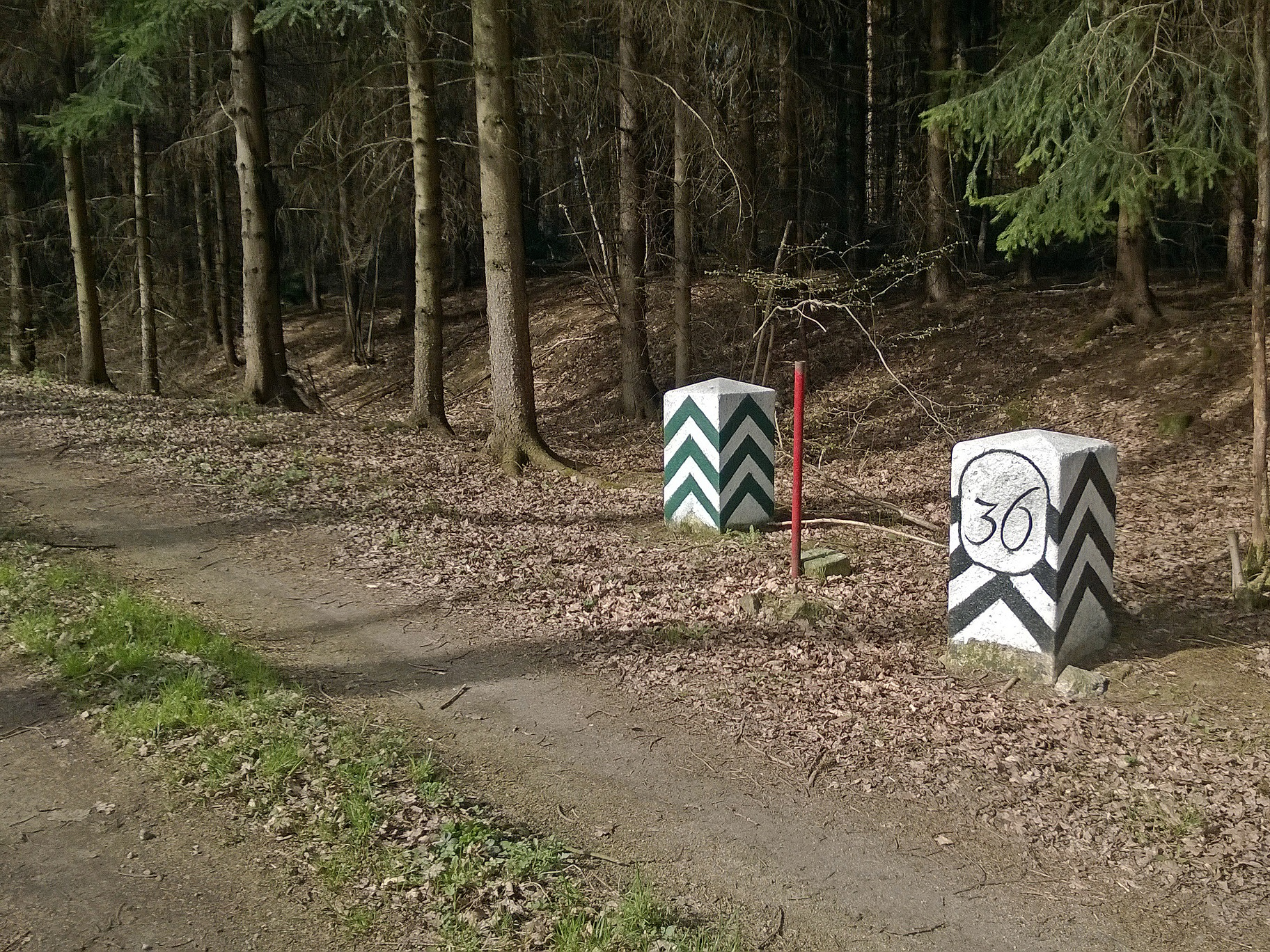 Grenzsteine Nr. 36 - Historische Landesgrenze Königreich Sachsen Königreich Preußen 1815 (Wiener Kongress)